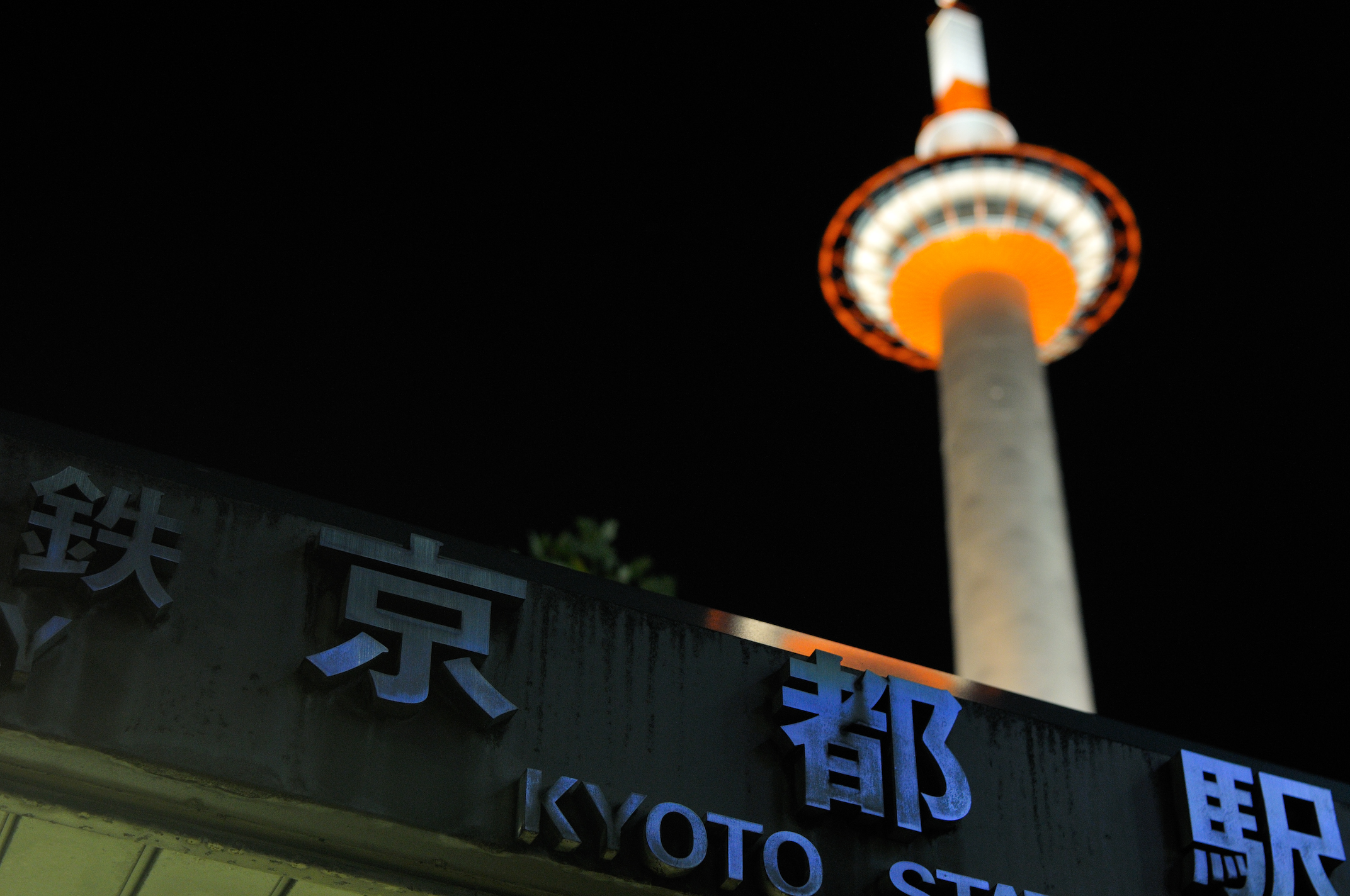 どうしても集中するために自宅でない場所で働きたくて、テレビのCMにつられ思わず京都まできてしまった10月9日。新幹線で超集中できたので、小一時間25年ぶりの京都を散歩してみた